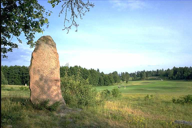 Inskriften lyder: Ulvkättil och Gye och Une de lät resa denna sten efter Ulv, sin gode fader. Han bodde i Skålhamra. Gud och Guds moder hjälpe hans ande och själ, förläne honom ljus och paradis. Motiv: U160 Risbyle Nyckelord: Runor Kategori: Runristning/runsten Inskriften lyder: Ulvkättil och Gye och Une de lät resa denna sten efter Ulv, sin gode fader. Han bodde i Skålhamra. Gud och Guds moder hjälpe hans ande och själ, förläne honom ljus och paradis.